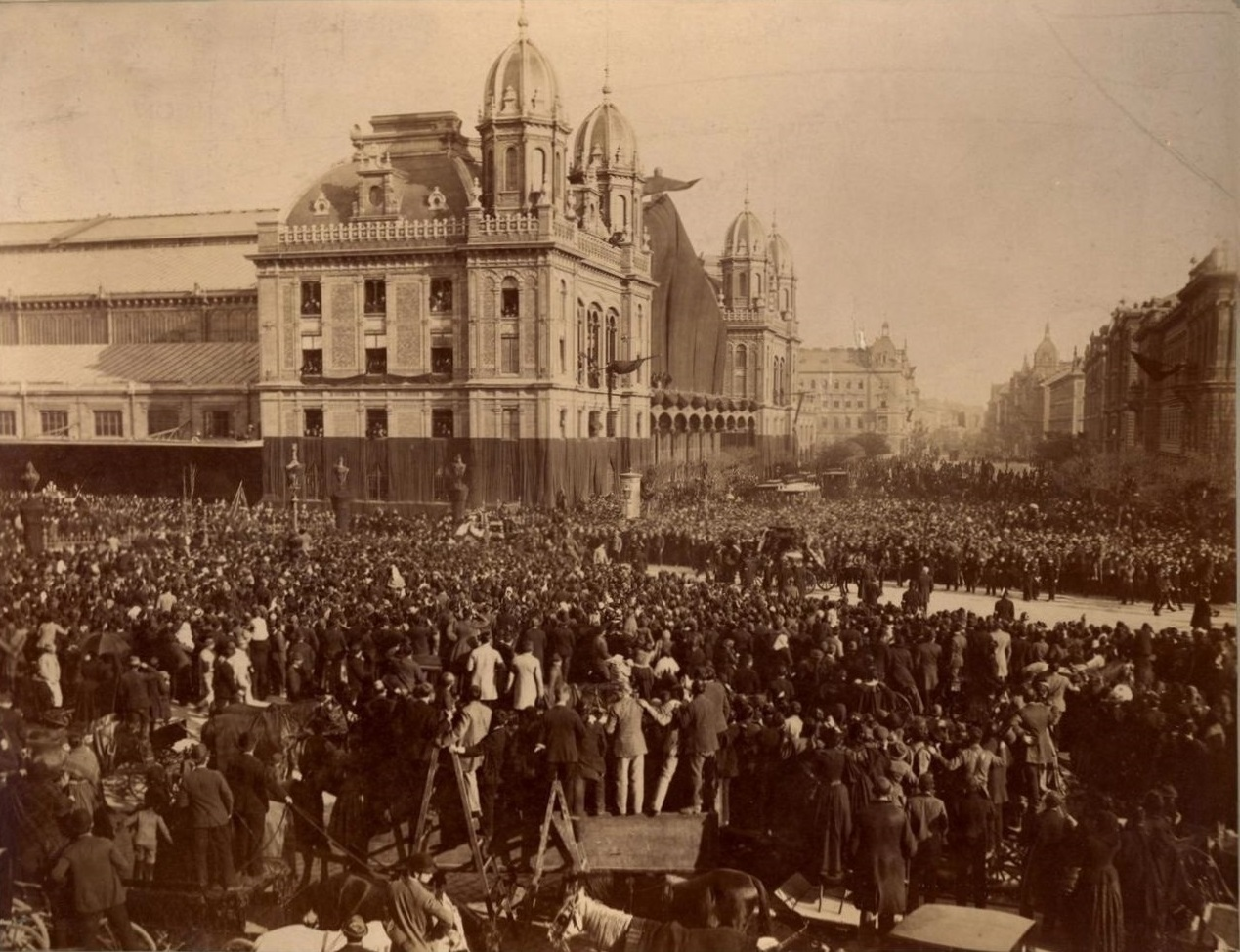 Kossuth Lajos koporsójának megérkezését várják a Nyugati pályaudvaron (Fővárosi Szabó Ervin Könyvtár Budapest Gyűjtemény)